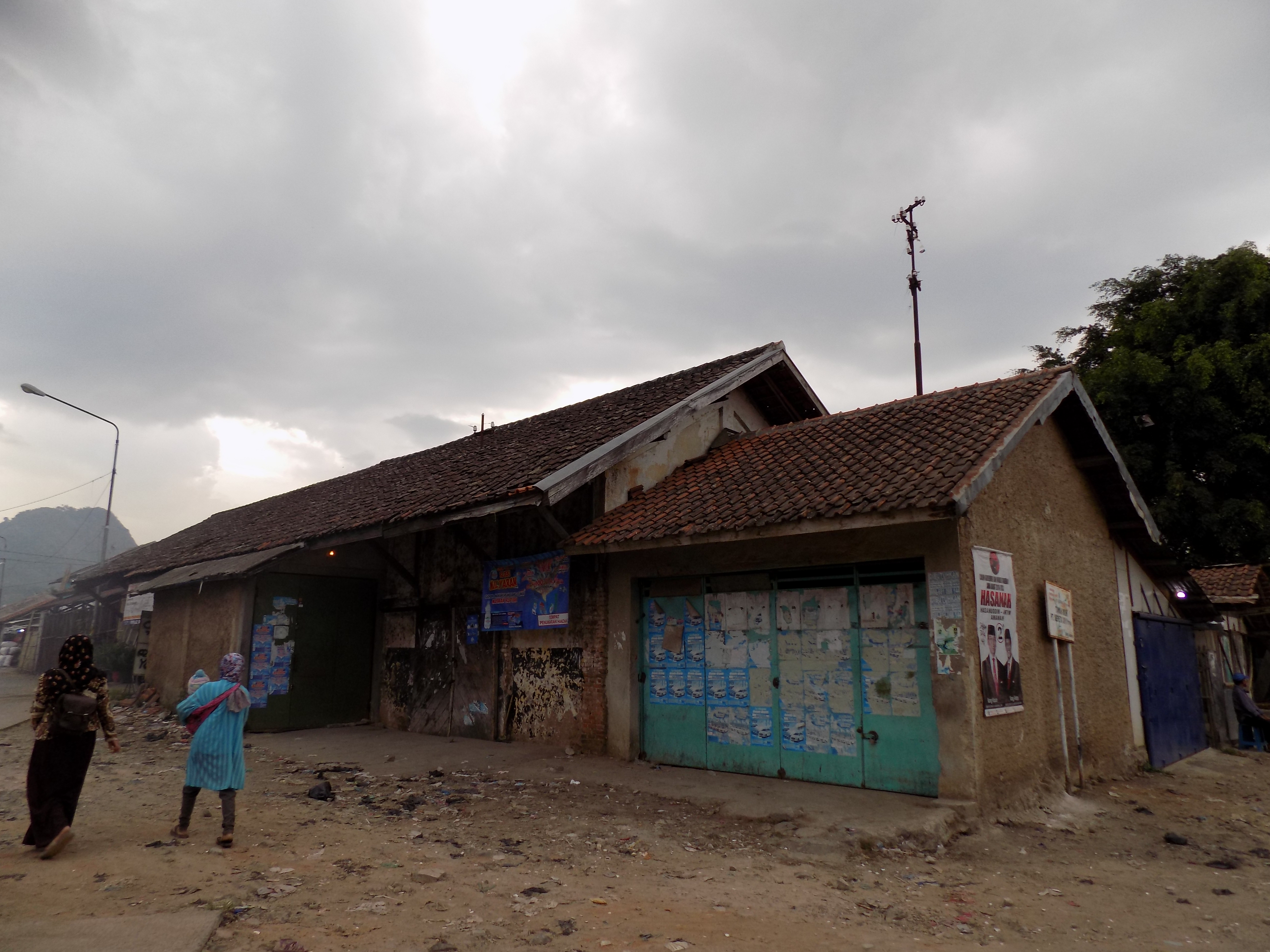 Stasiun Soreang